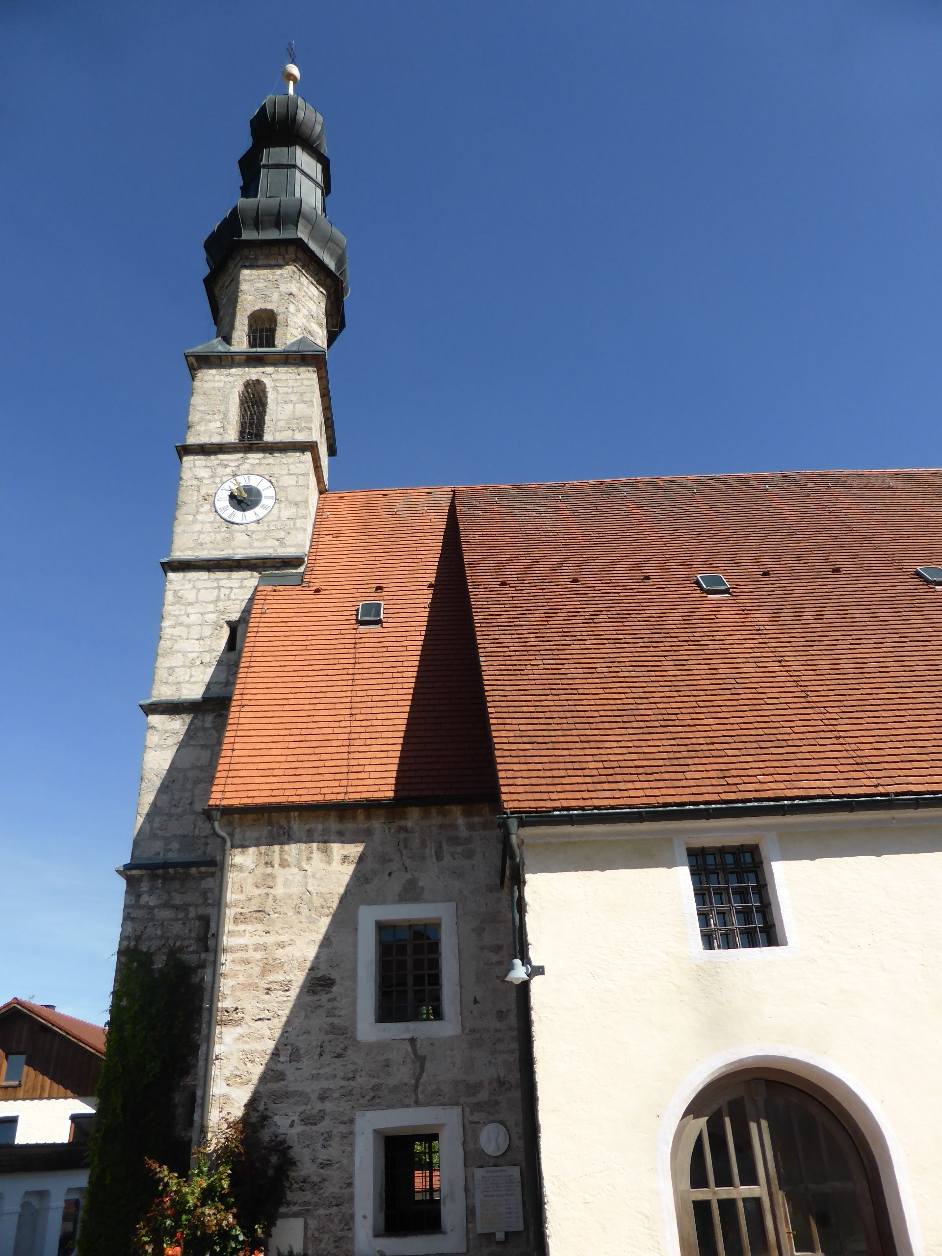 Kirchanschöring (Katholische Kirche St. Ägidius von Kirchstein-2)